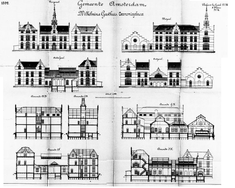 tekening gebouw Wilhelmina Gasthuis (Amsterdam)